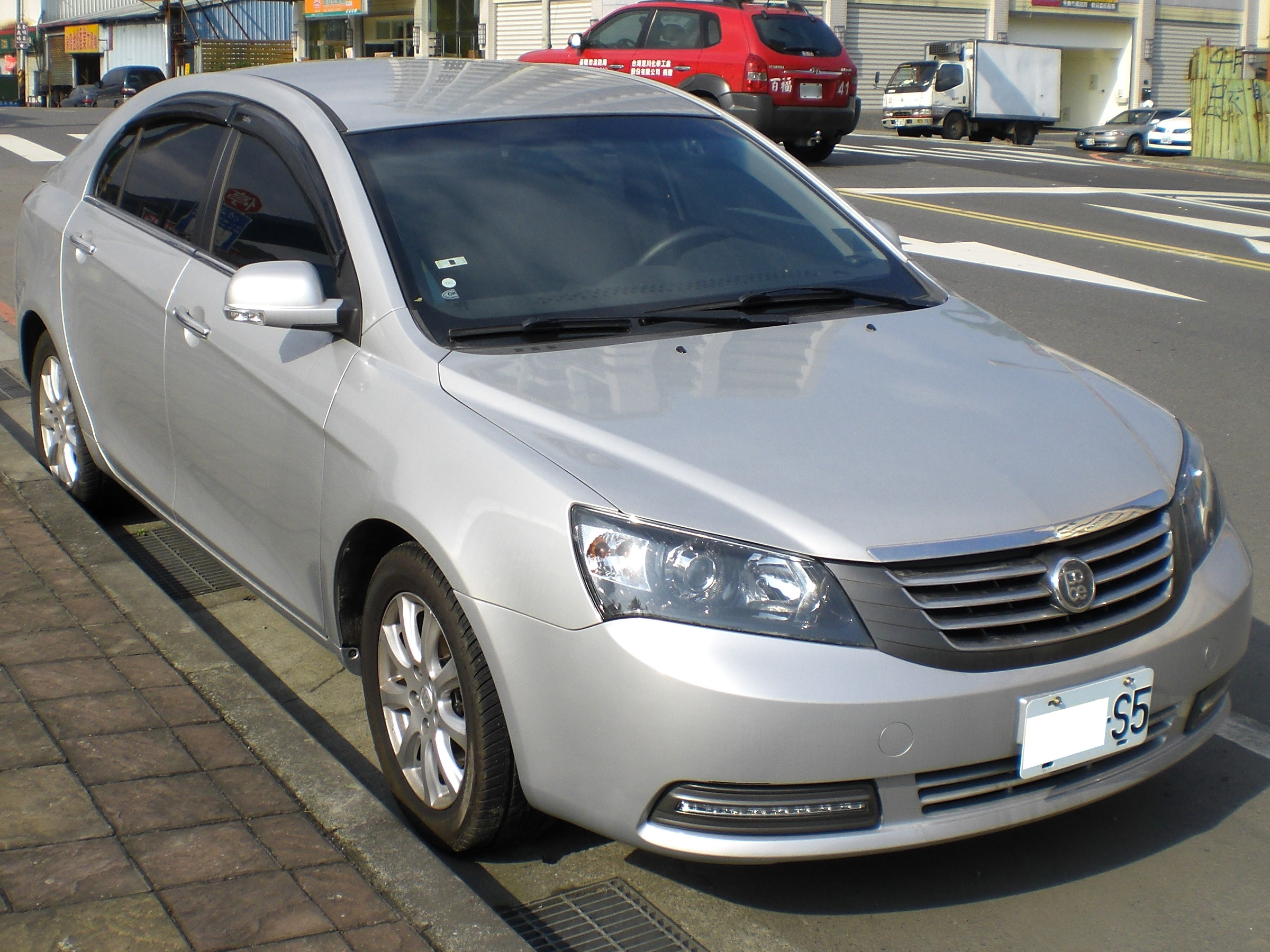 裕隆酷比汽車M'way中型房車右前方外觀